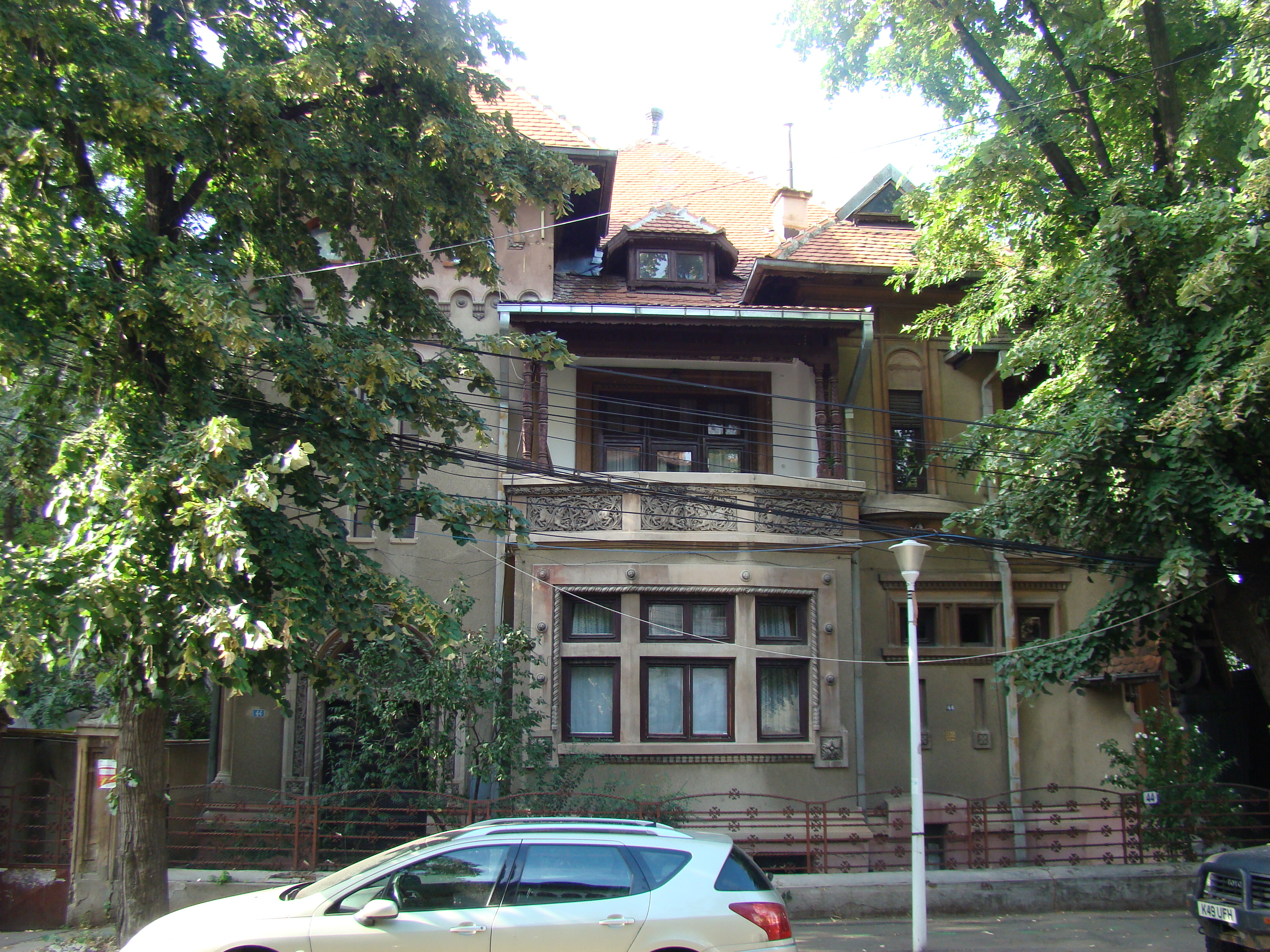 Casă monument istoric, str. Aleea Alexandru, nr. 44